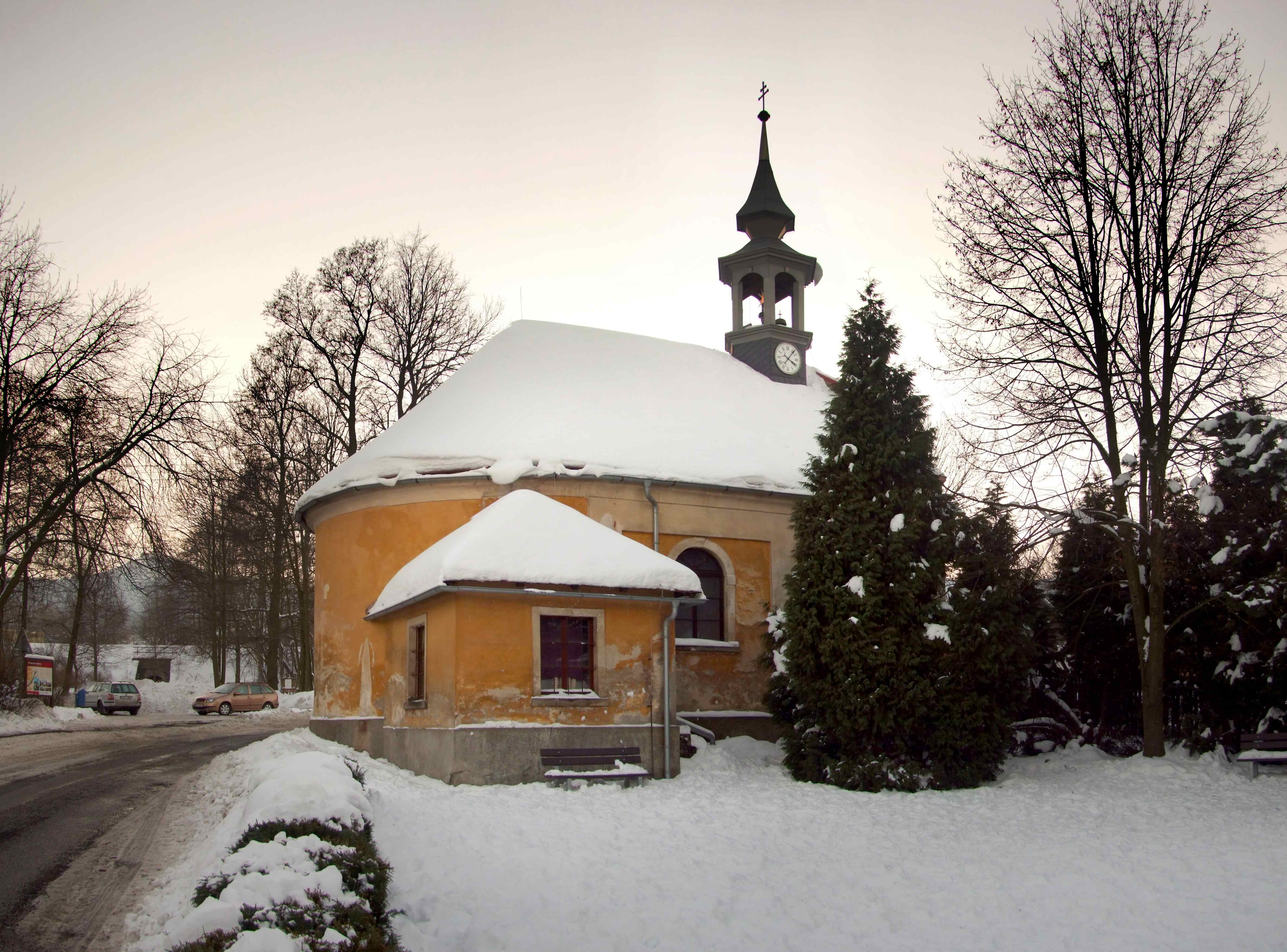 Pohled na kostel ve směru od křižovatky u základní školy Ostašov